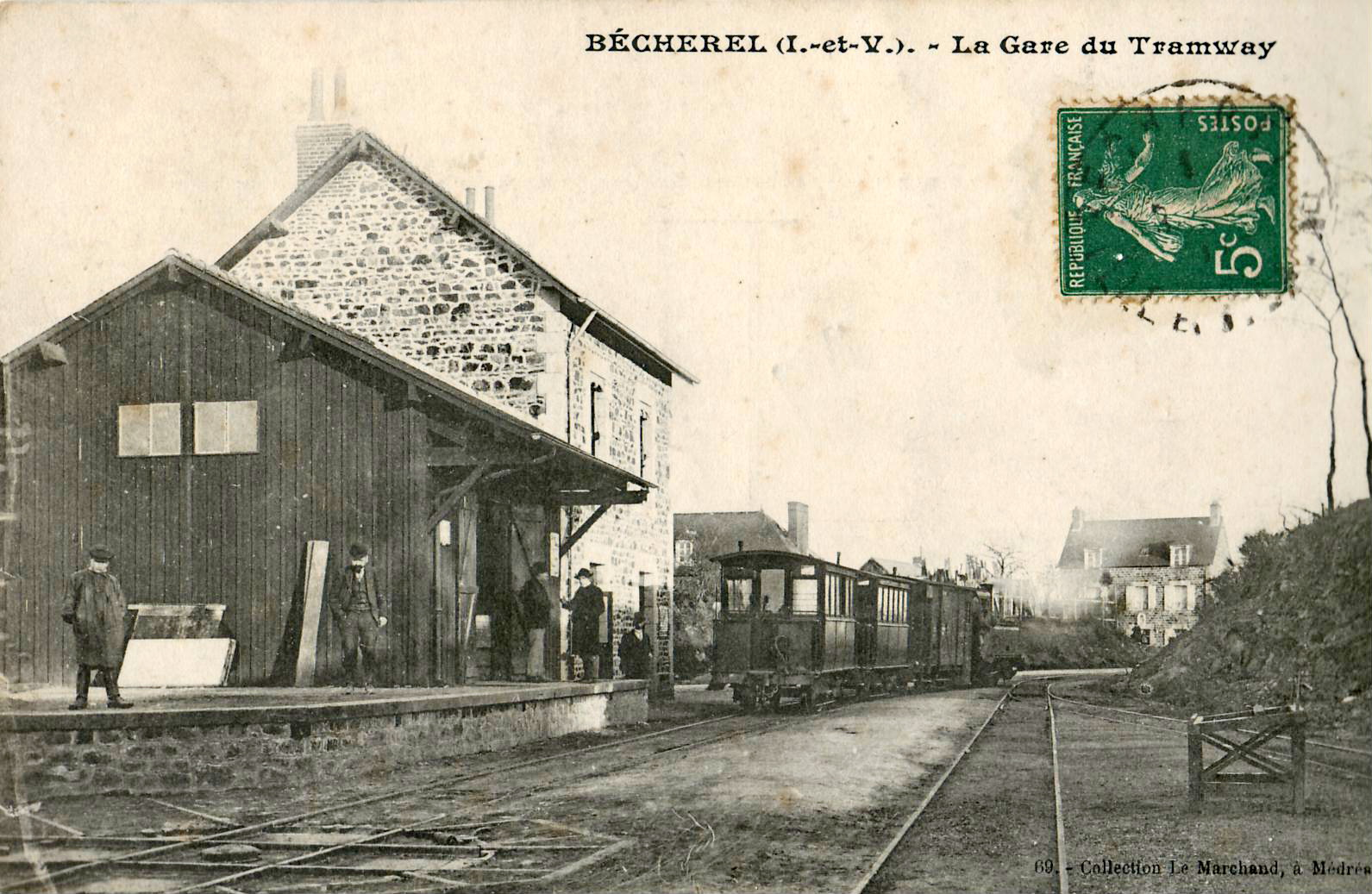 Carte postale ancienne, collection Le Marchand à Médréac : BÉCHEREL - La Gare du Tramway